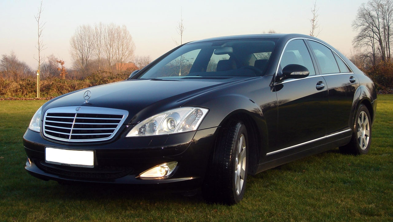 S-Klasse (S350) W221. Fadi, Nordhorn, 2005.